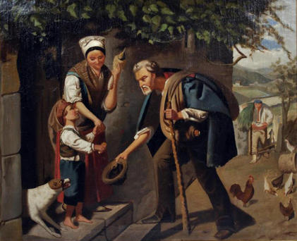 Antonio Lecuona. Museo San Telmo